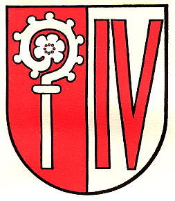 Wappen von Quarten Kanton St.gallen Schweiz